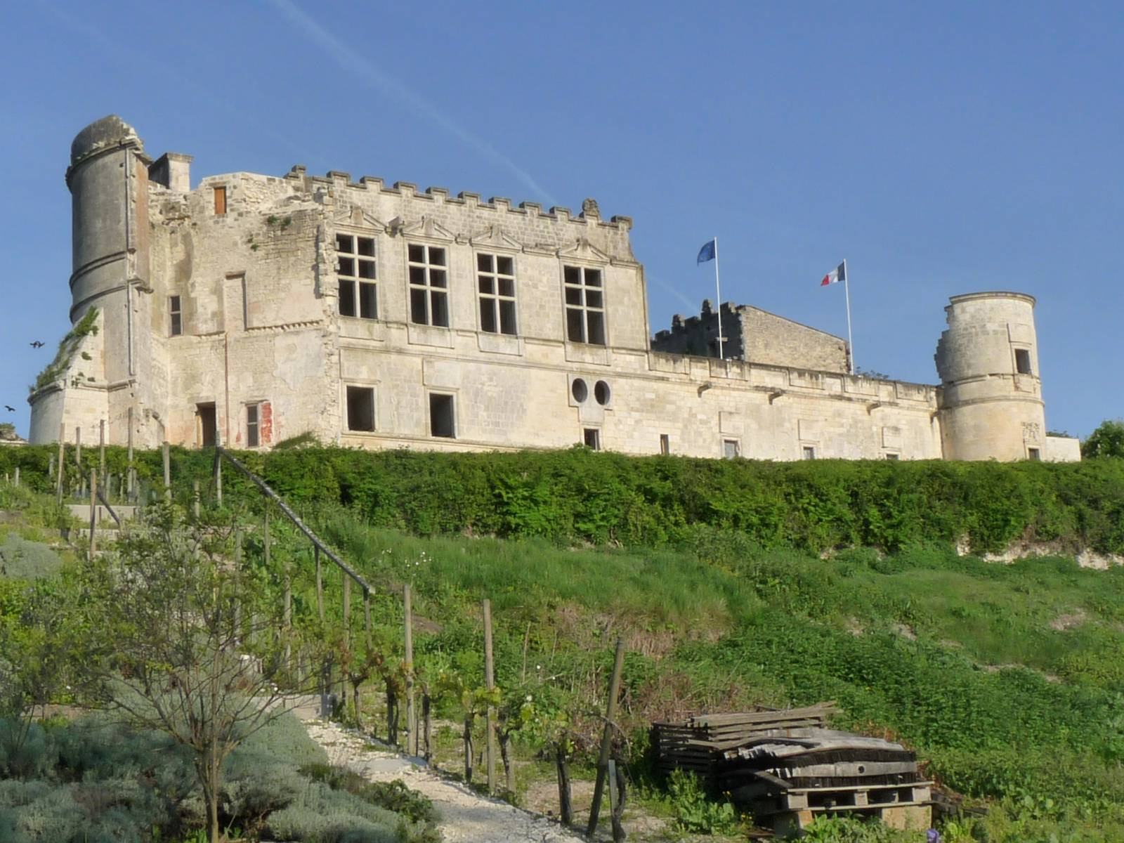 Façade Est du château de Bouteville, Charente, France